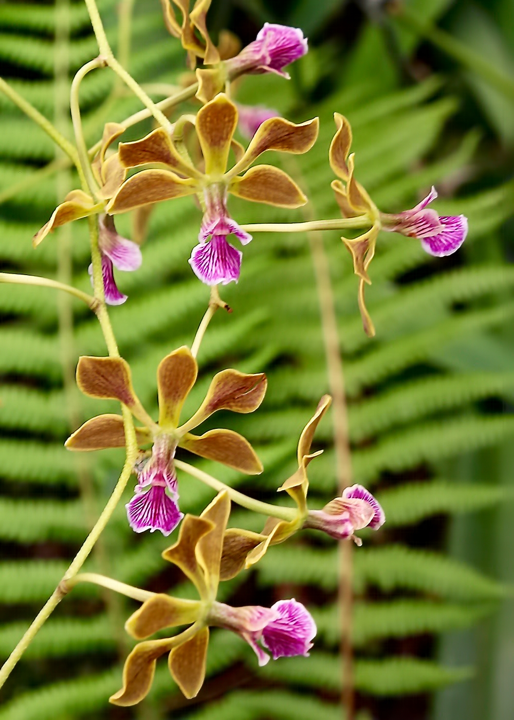 Encyclia naranjapatensis, Quito Botanical Garden